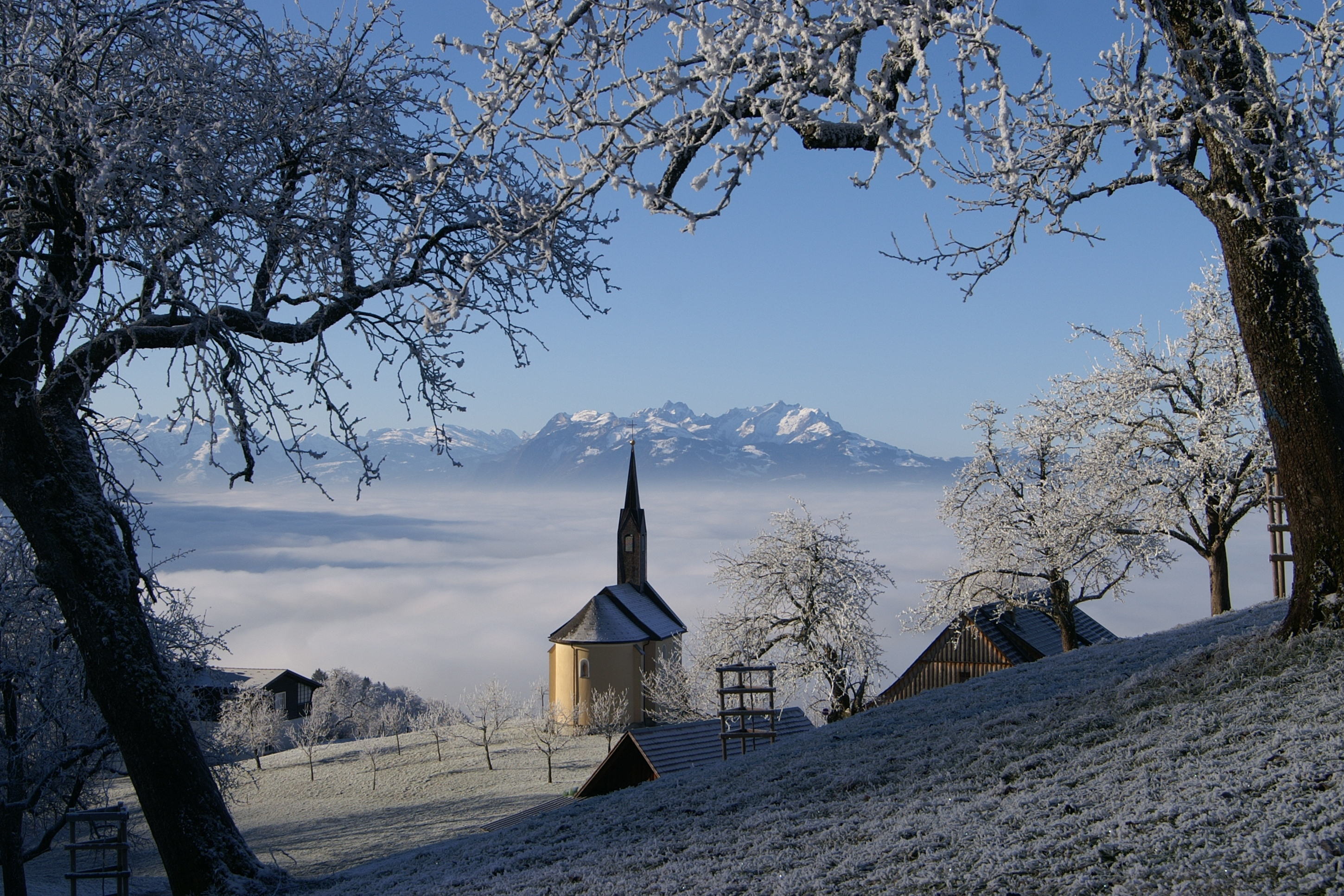 Der Oberfallenberg in Dornbirn mit Blick auf die Schweizer Berge